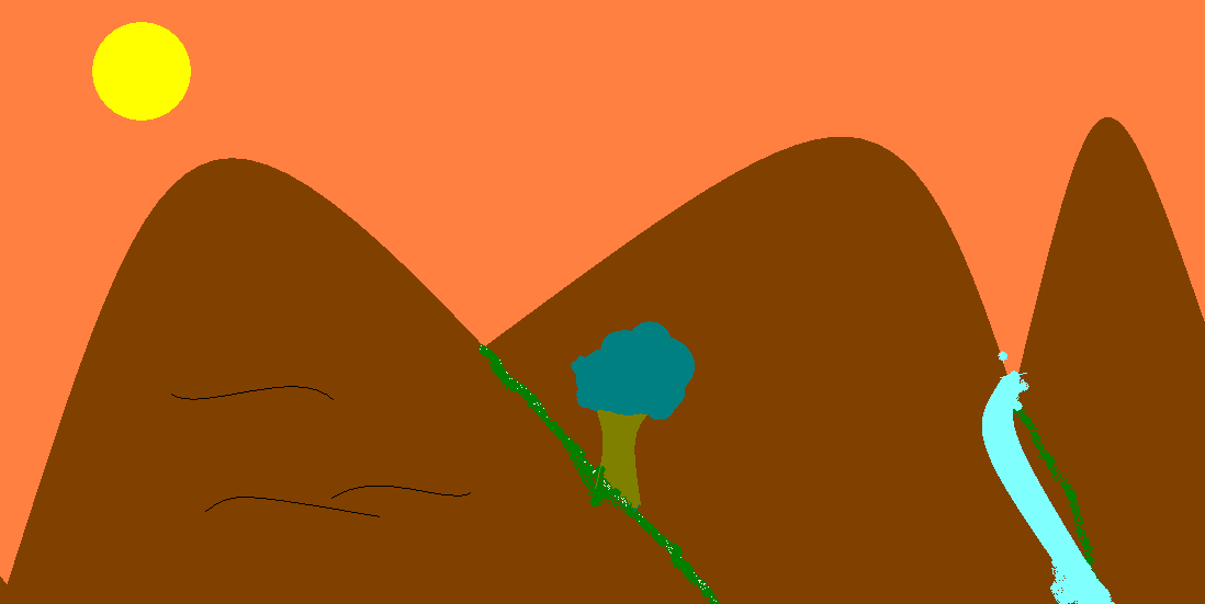 Paisagem natural com um rio e uma árvore.